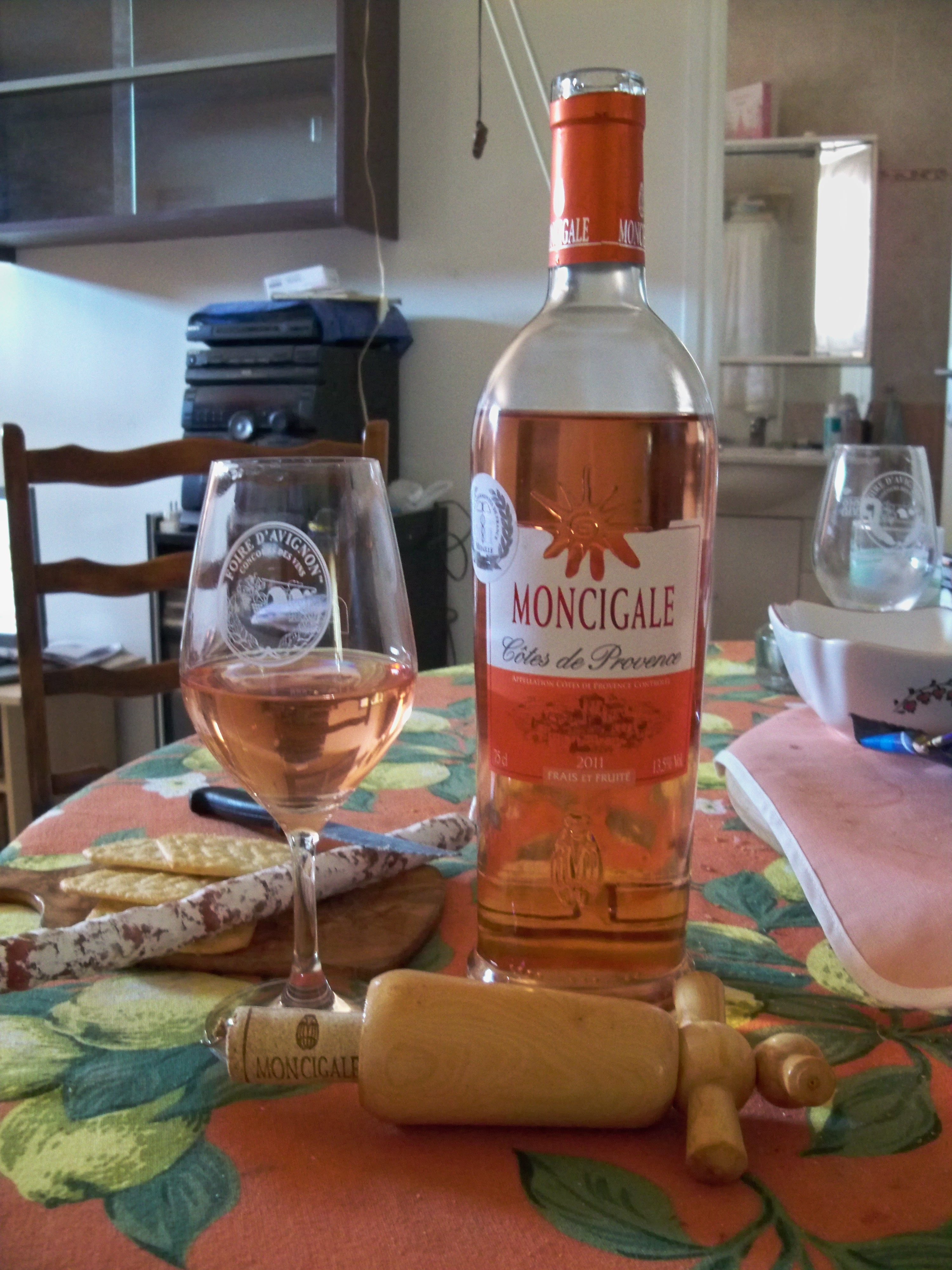 bouteille de Moncigale - côtes de Provence